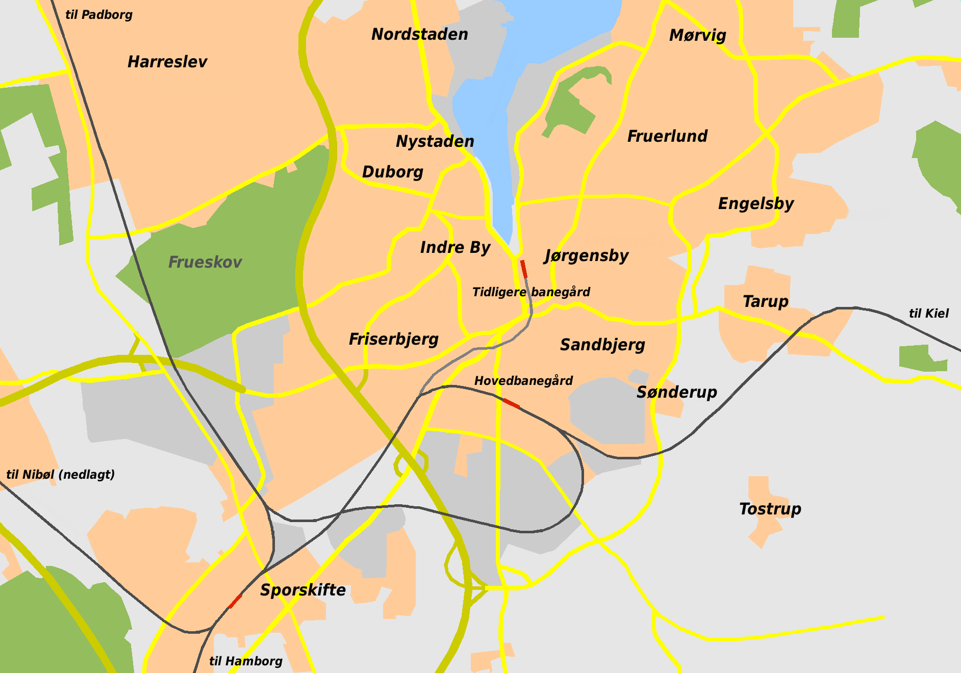 Kort over baneanlæg i Flensborg